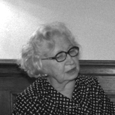 ADN-ZB/Schindler/20.9.89 [Herausgabedatum]/Berlin: Begegnung mit Egon Krenz In der Akademie der Künste las die Niederländerin Miep Gies aus ihrem Buch "Meine Zeit mit Anne Frank". Nach der Lesung kam es zwischen der Autorin und Egon Krenz, Mitglied des Politbüros und Sekretär des ZK der SED, zu einem Gespräch. Abgebildete Personen: Gies, Miep (GND Autorin Schriftstellerin, Autorin)